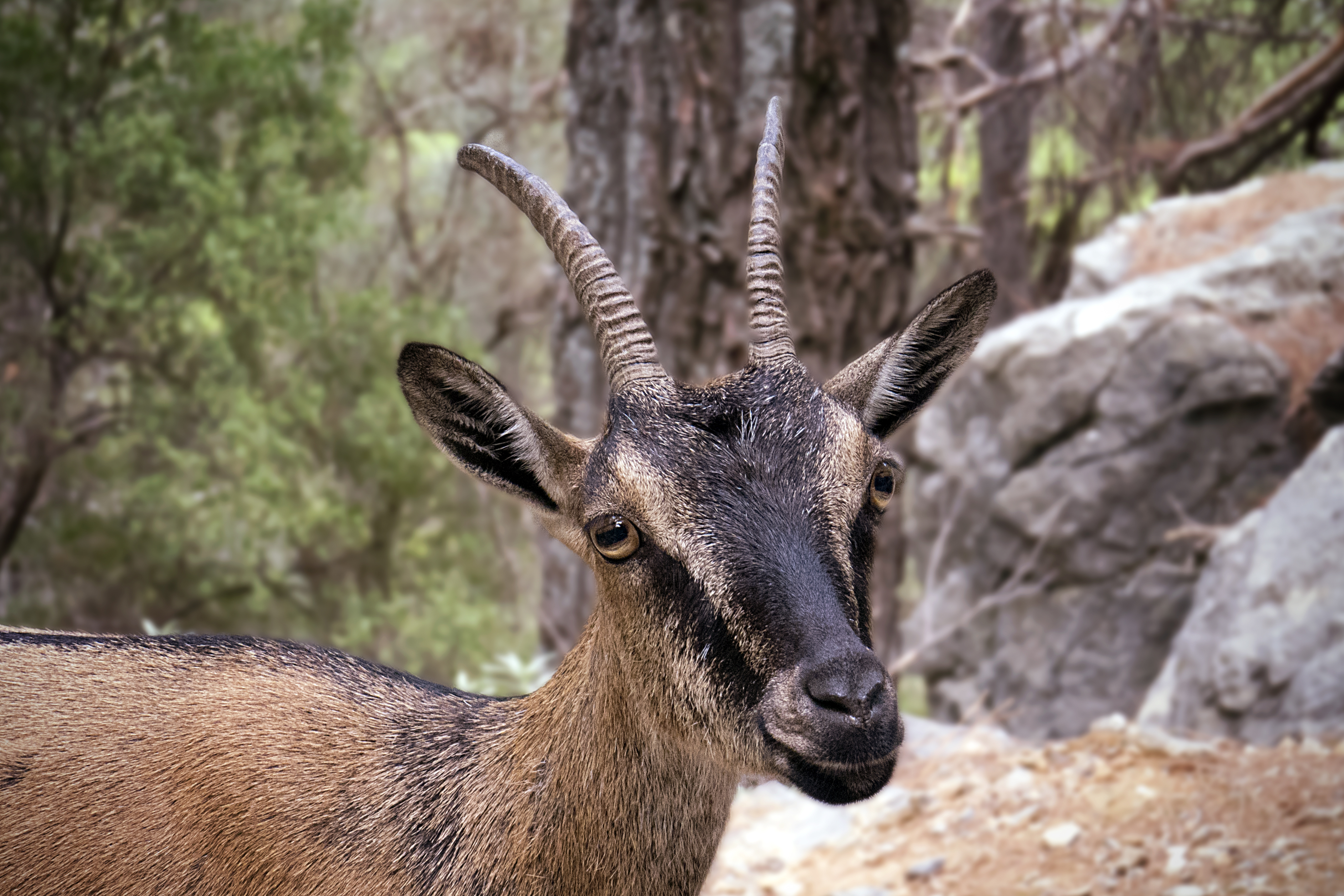 Κρητικό αγριοκάτσικο, Capra aegagrus [1] This is a photography of Natura 2000 protected area with ID GR4340014